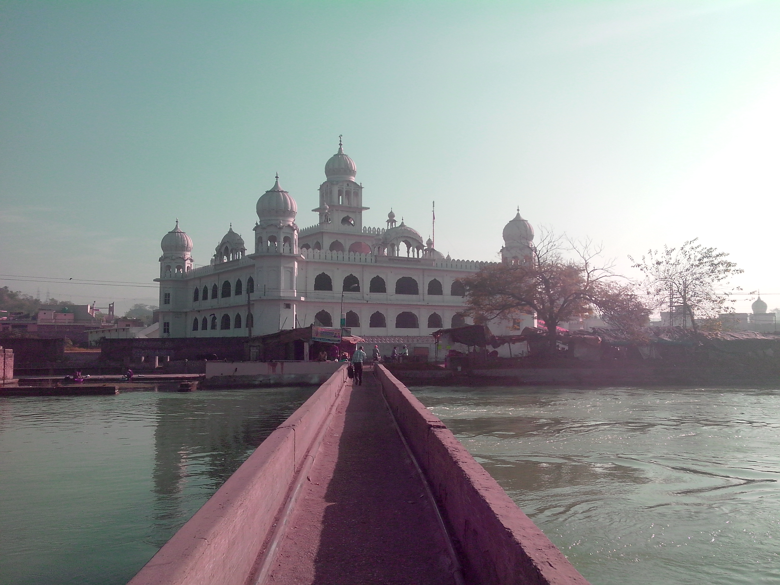 Kiratpur Gurudwara